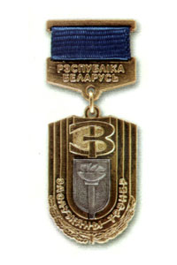 Знак к почётному званию «Заслуженный мастер спорта Республики Беларусь» (вариант 2005 года)